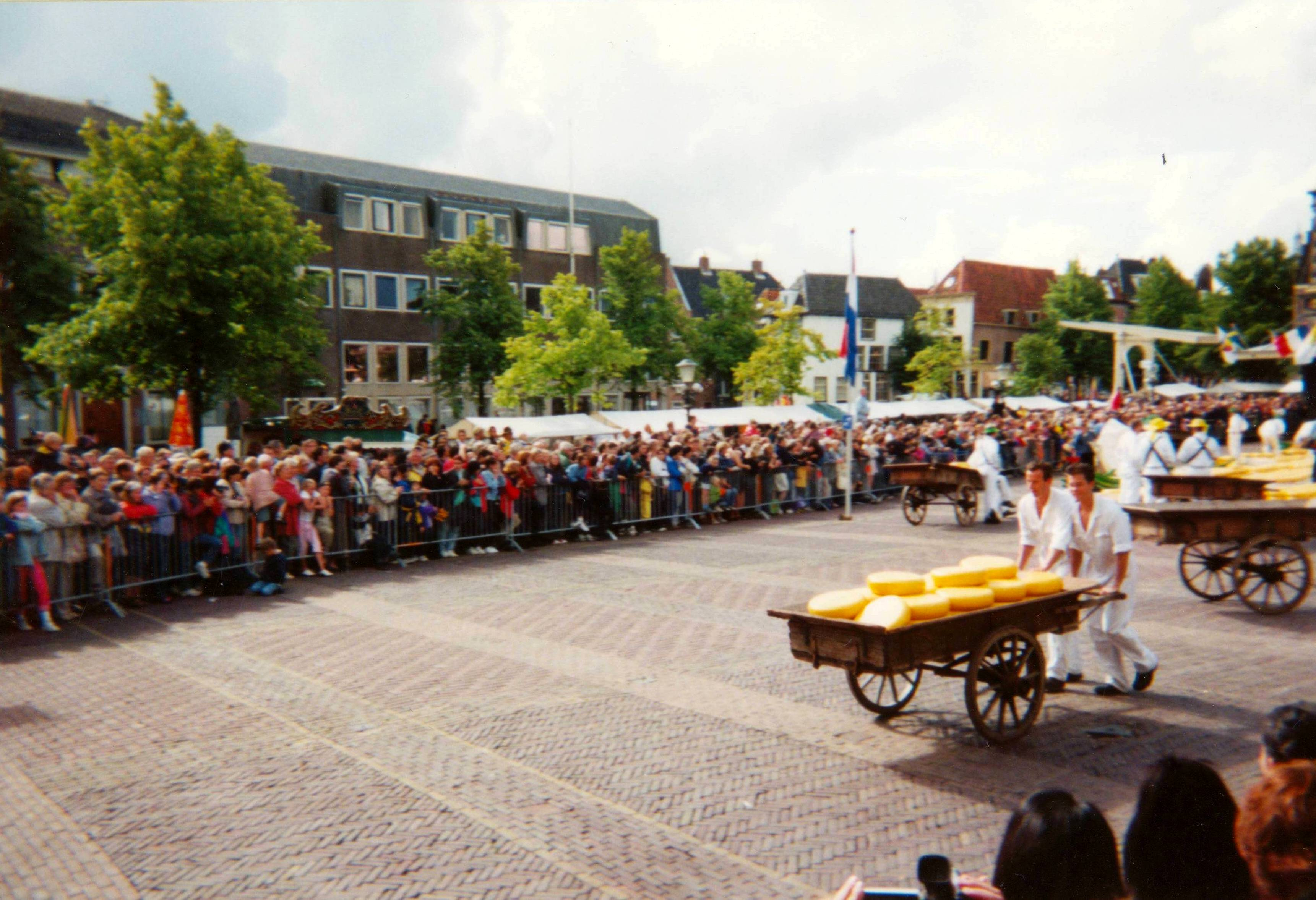 Kaasmarkt Alkmaar (The Netherlands) Keyword: Cheese